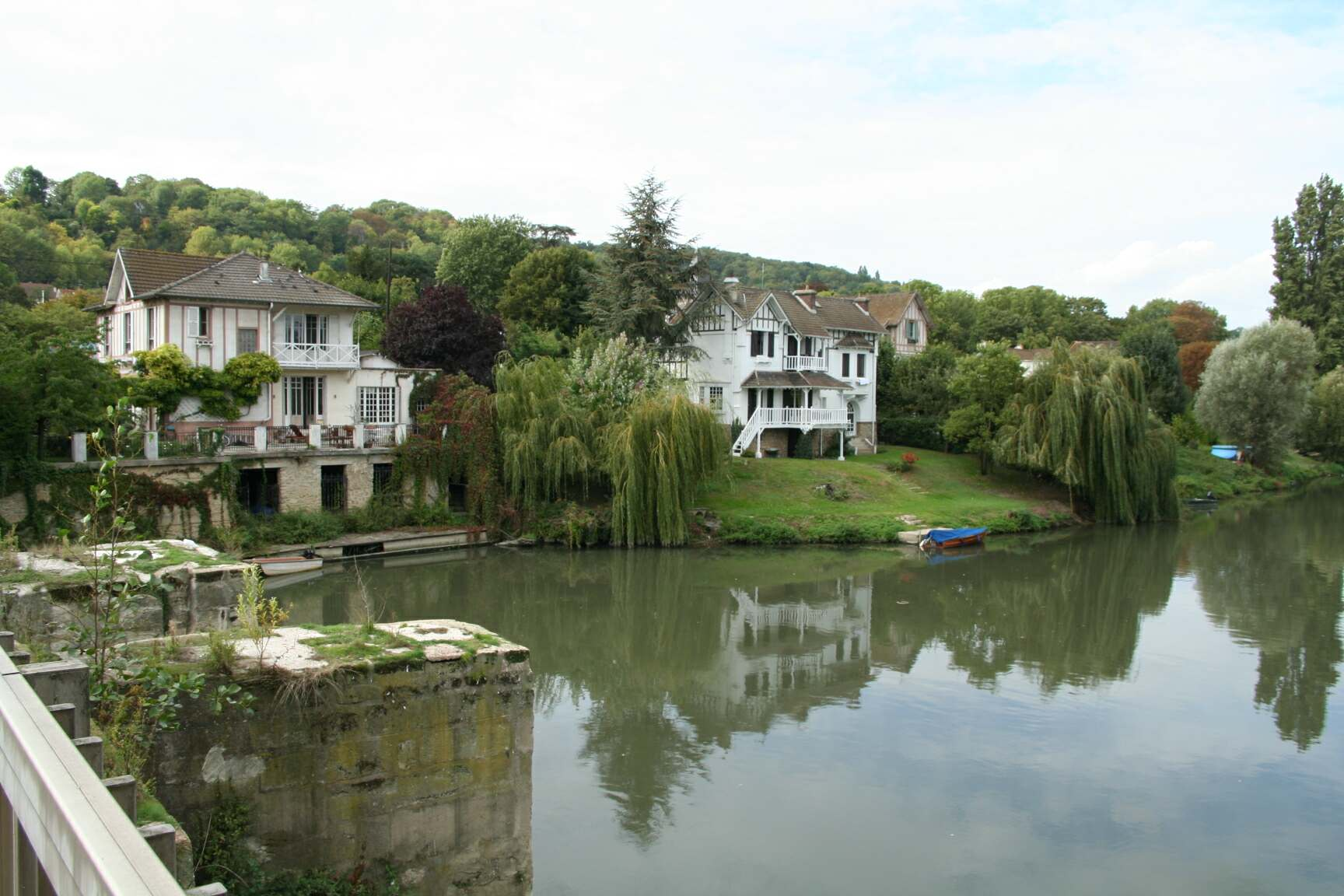 La Seine à Villennes-sur-Seine - Yvelines (France), bras de Villennes vers l'aval